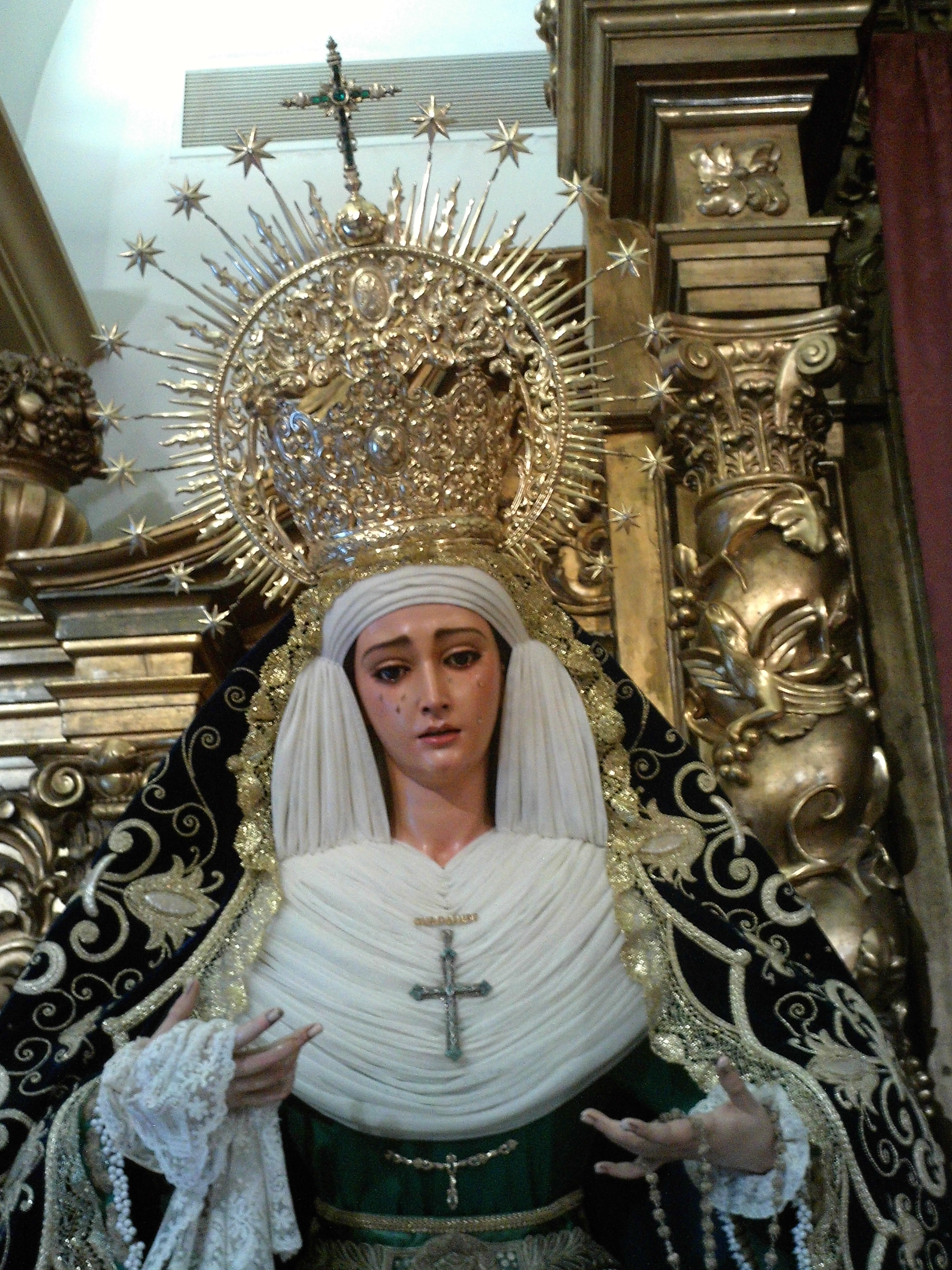 Virgen de Guadalupe (Luis Álvarez Duarte, 1965) de la Hermandad de las Aguas, sita en la capilla del Rosario, Sevilla, Andalucía, España.